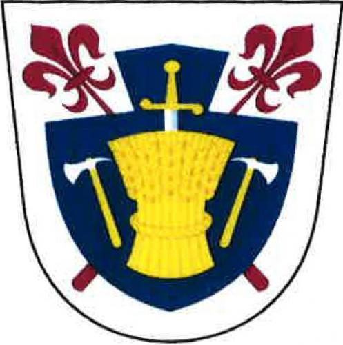 Němčice, okres Mladá Boleslav, znak